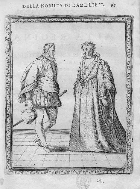 Fabrizio Caroso, "Della nobilita di dame", grabado calcográfico de Giacomo Franco. Biblioteca Nacional de España